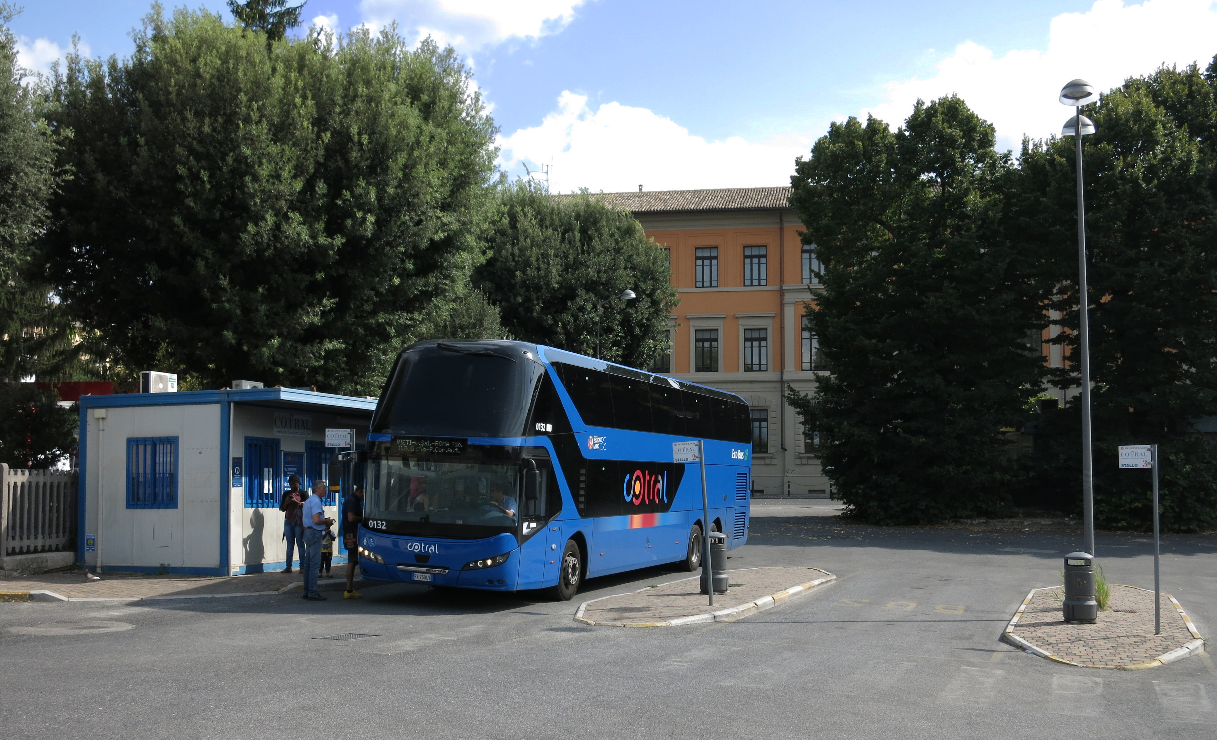 Autobus a due piani Neoplan Skyliner della Cotral (matricola 0132) in servizio sulla linea Rieti-Roma Tiburtina, fotografato all'autostazione di Rieti